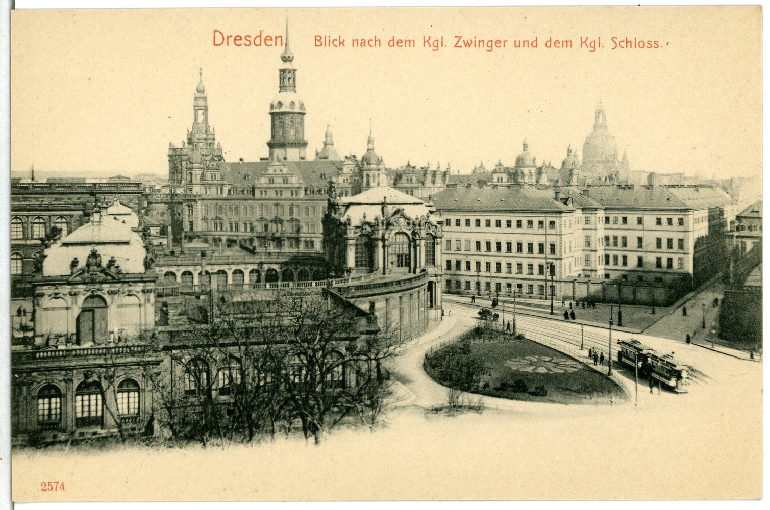 Dresden; Zwinger und Schloß mit Straßenbahn This postcard is from publisher Brück & Sohn in Meißen ( postcard has a unique number 02574 and is available in a higher resolution at the publisher. This images was uploaded in a cooperation project between Wikipedians and the publisher.